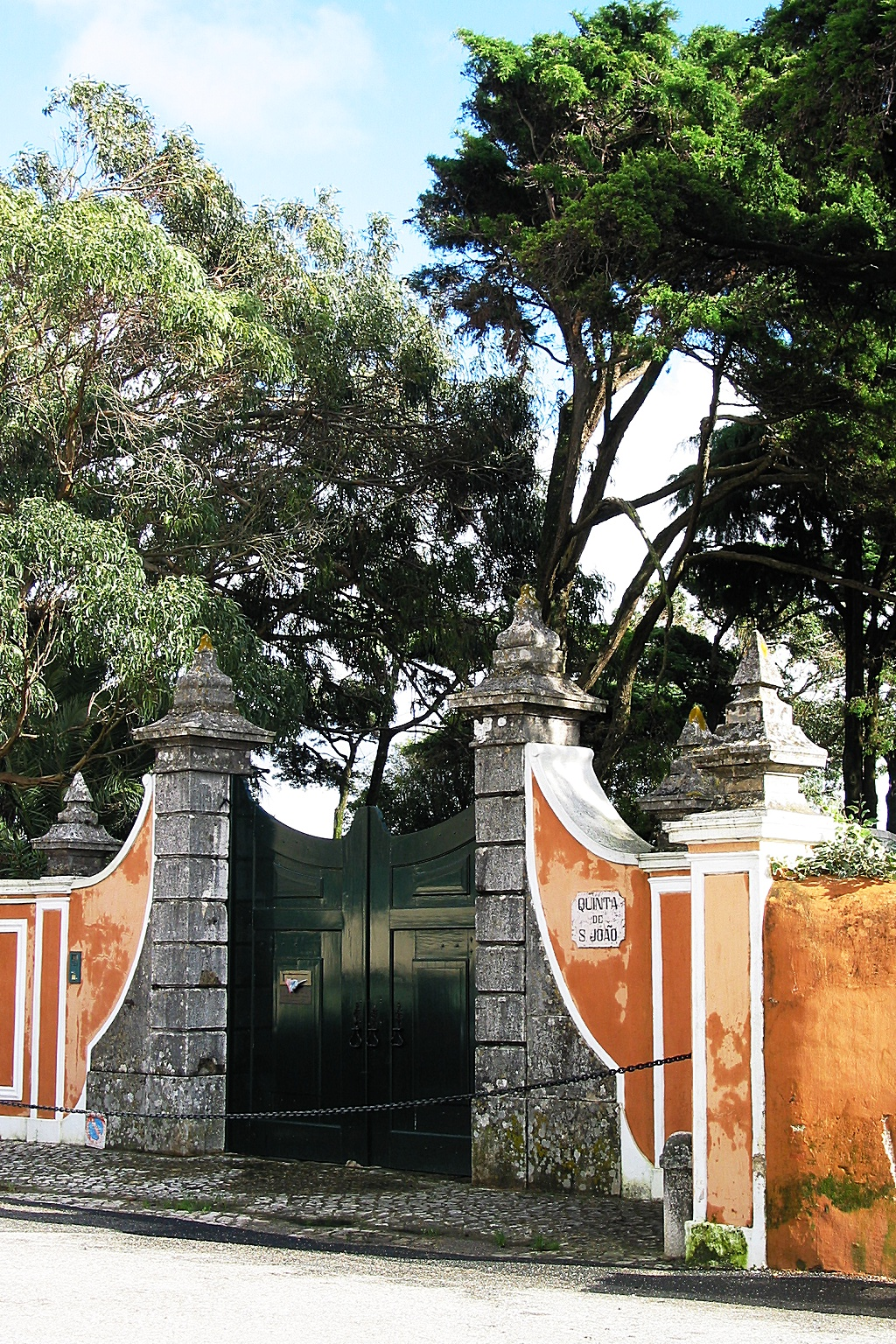 December 2002